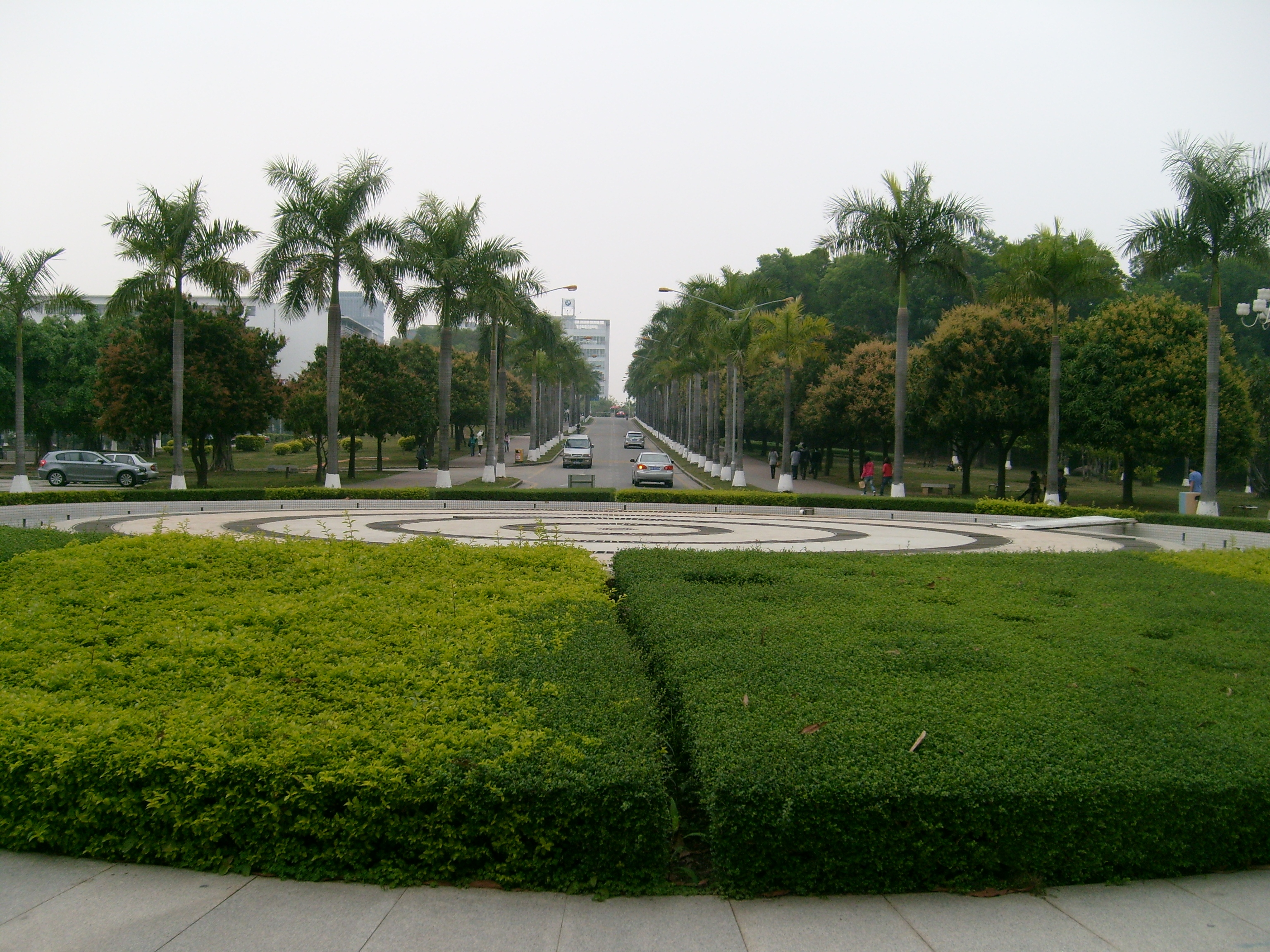 深圳大学北门道路